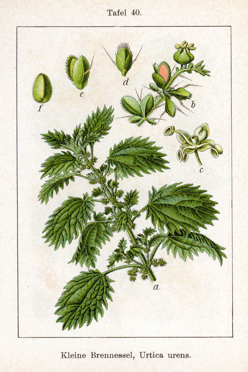 Urtica urens L. Original Description Kleine Brennnessel, Urtica urens